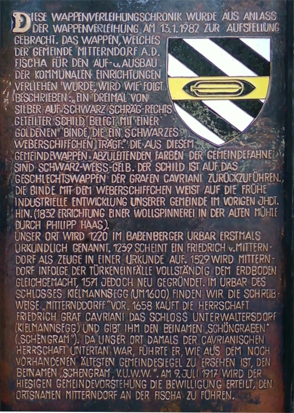 Wappenverleihungschronik